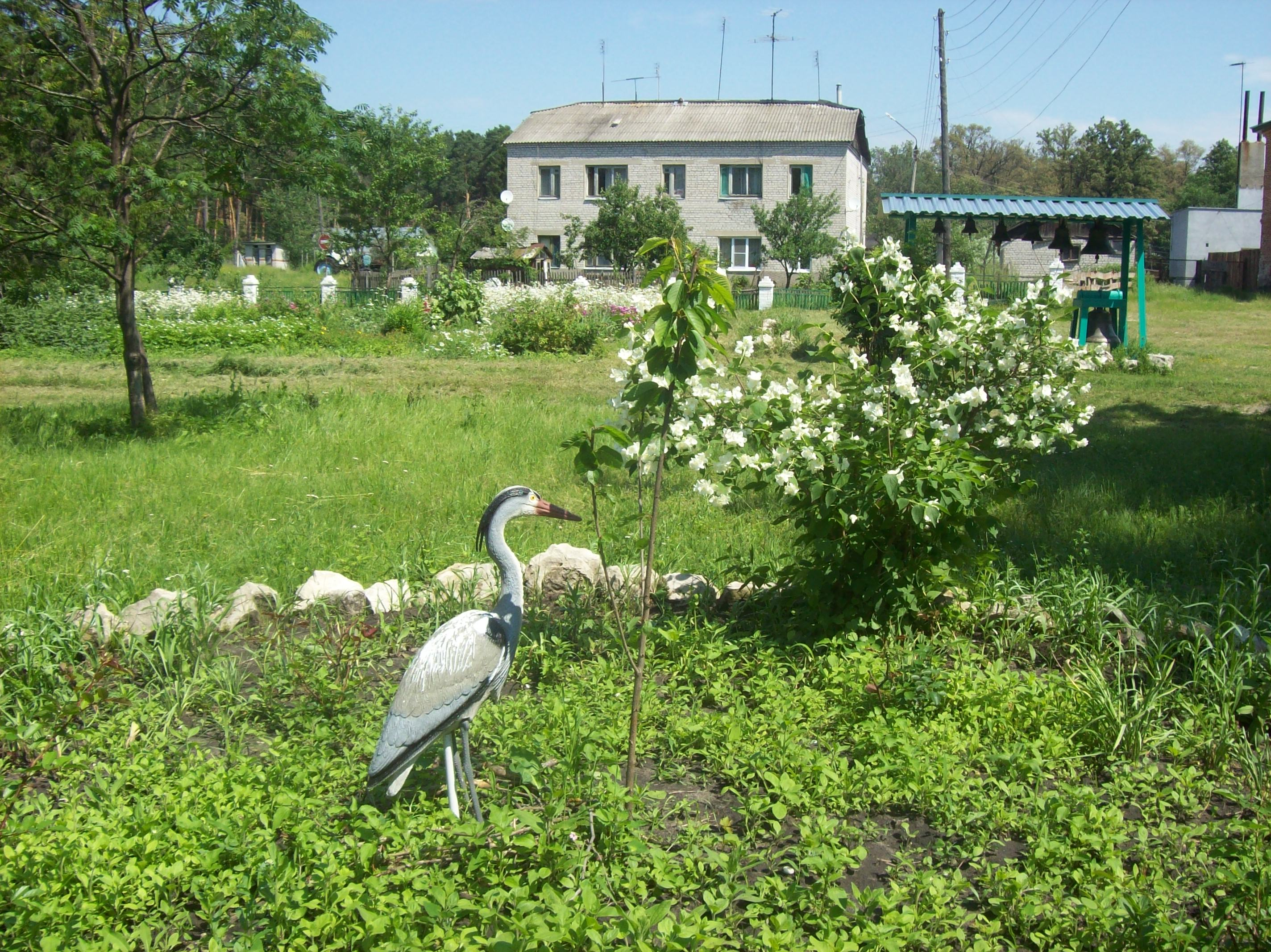 Воронежская область. Вид в Толшевском монастыре